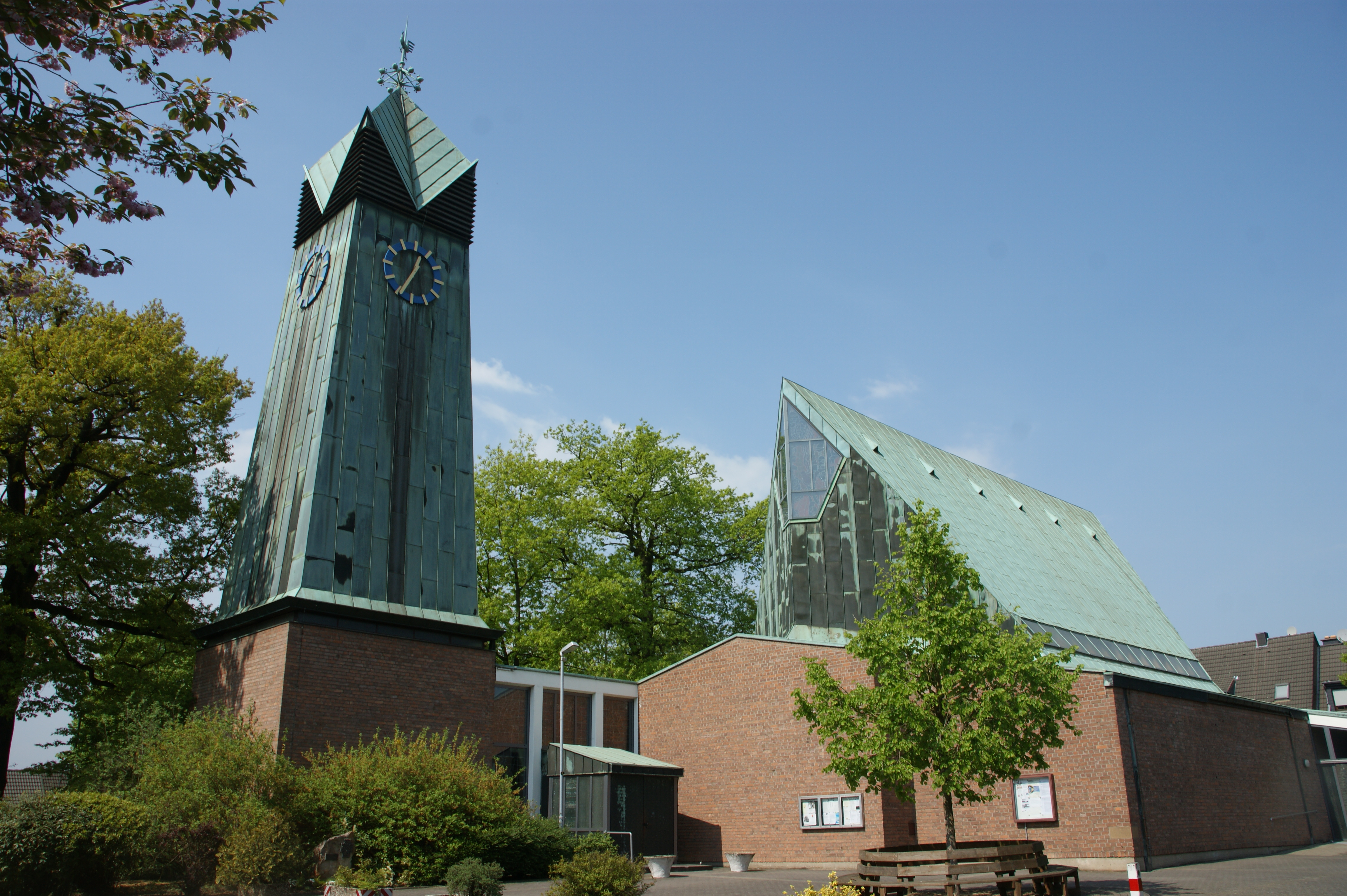 Kirche in Kerpen, Neu-Bottenbroich